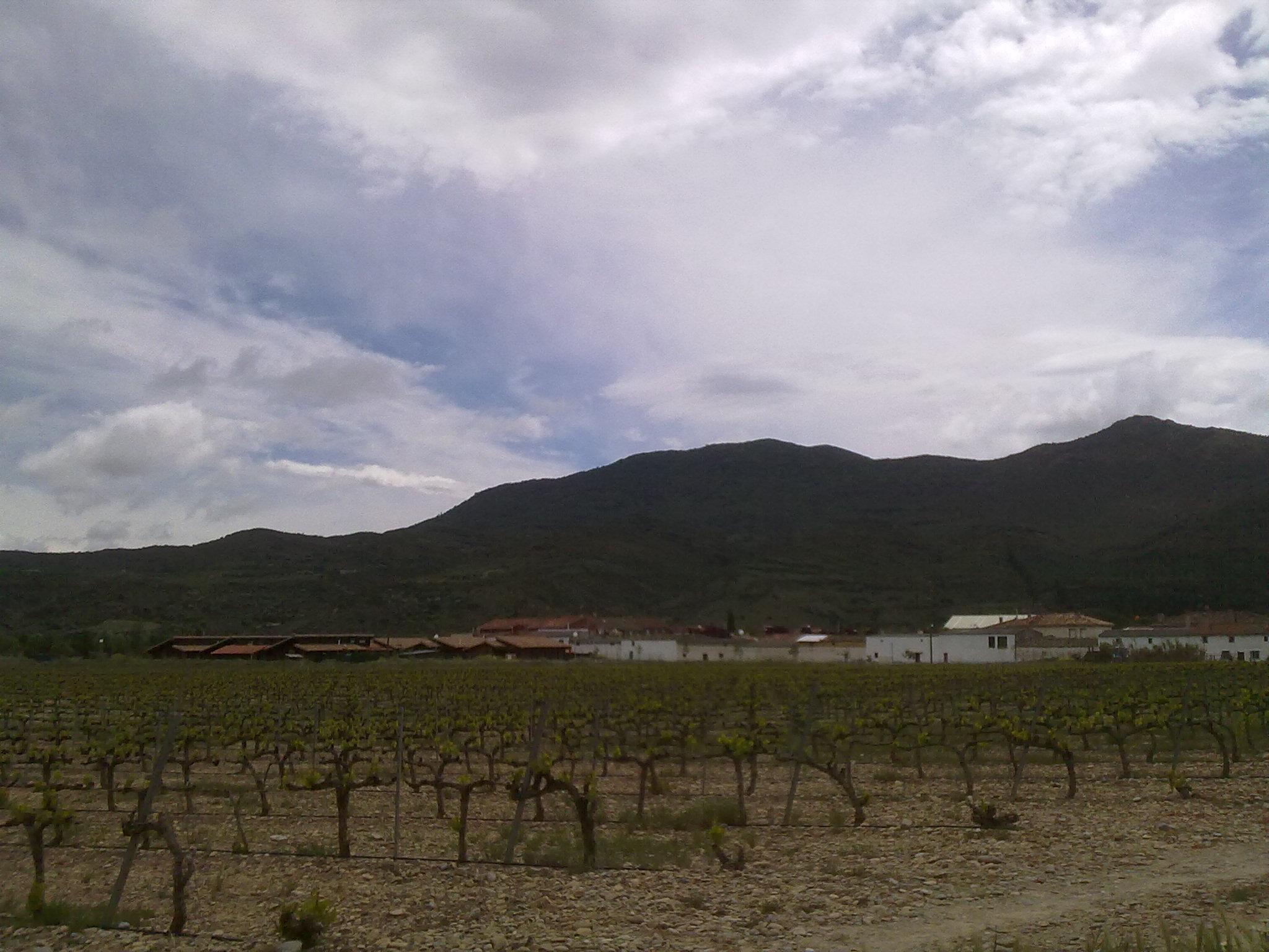 Galipentzu Berriko mahastien ikuspegia.